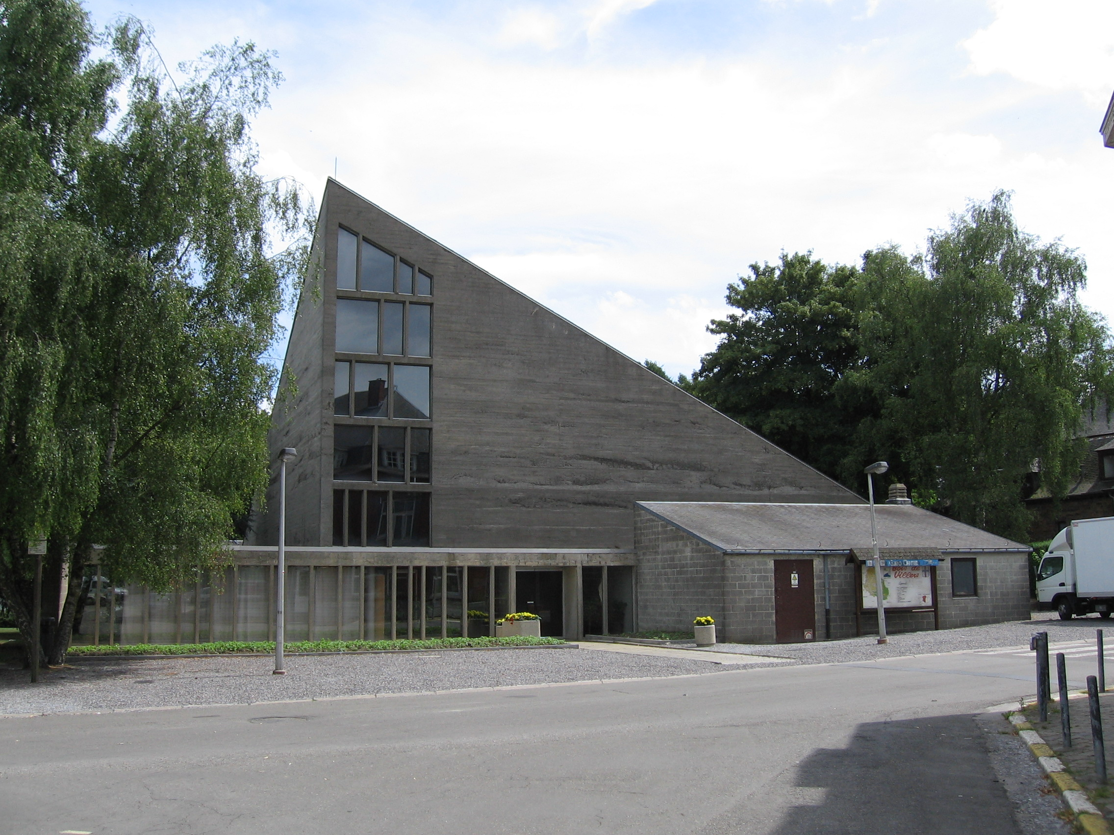 Eglise Saint-Roch, à Bois-de-Villers (Belgique). Architecte: Roger Bastin.